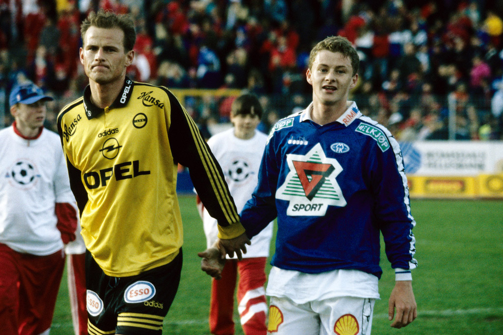 Molde-spiller Ole Gunnar Solskjær takker Lillestrøm-spiller Ståle Solbakken for kampen på Molde stadion en gang på midten av 1990-tallet. (16. mai 1996?) Solskjær ble solgt til Manchester United i juli 1996.